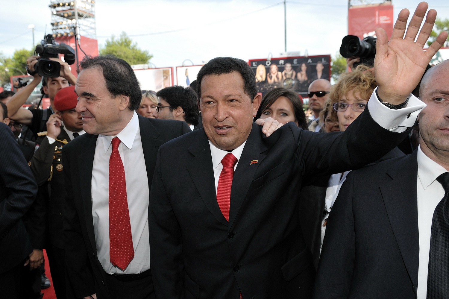 66ème Festival du Cinéma de Venise (Mostra), 6ème jour (07/09/2009) Hugo Chavez Le président du Venezuela a volé la vedette aux stars de cinéma après la projection de South of the border, un documentaire au ton hagiographique où l'Américain Oliver Stone défend sa révolution pacifiste